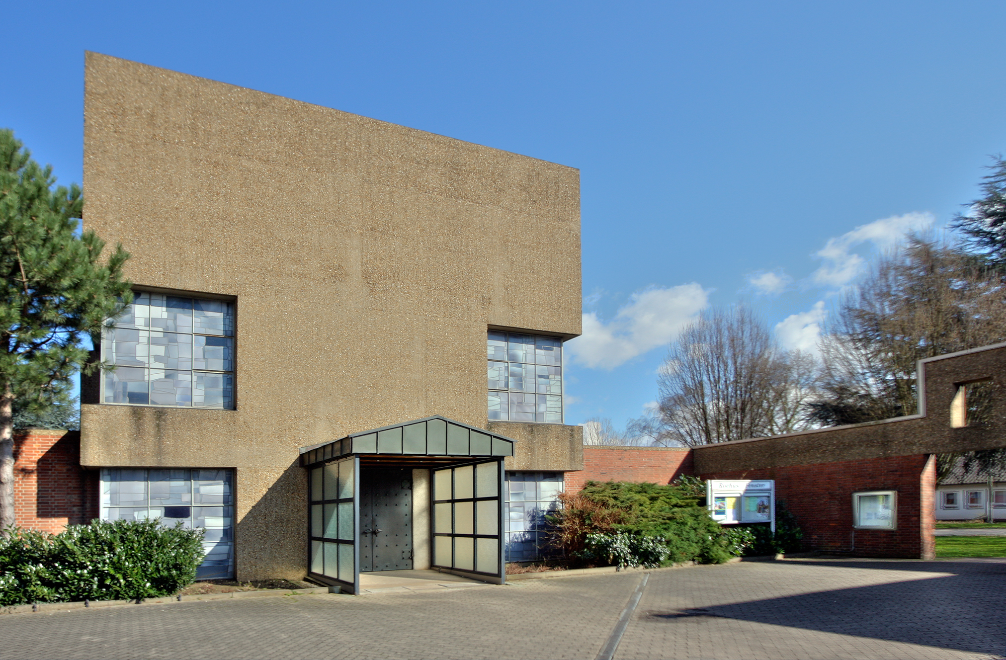 Kirche St. Rochus in Jülich. Architekt: Gottfried Böhm